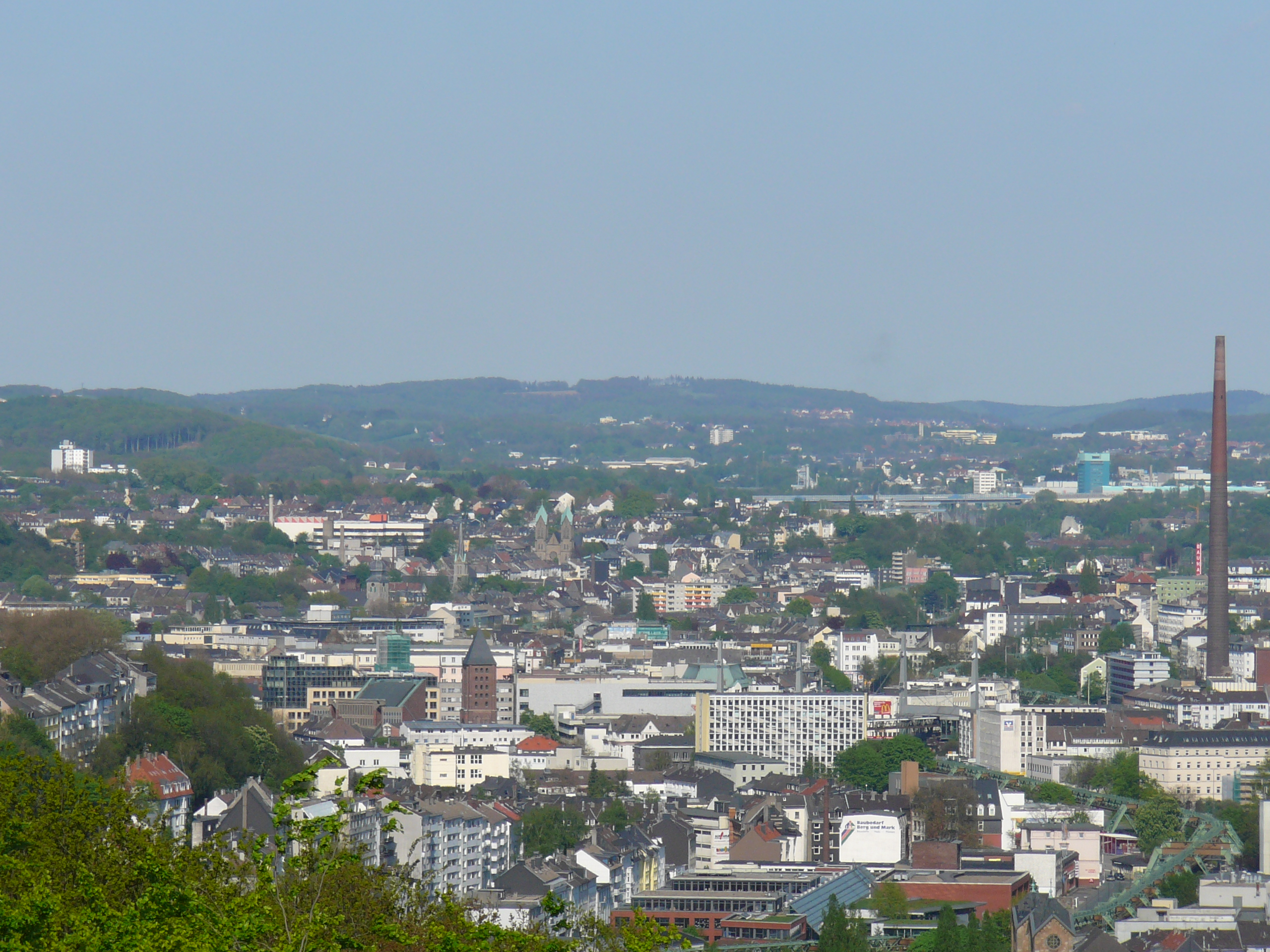 Hardt-Anlagen, Wuppertal